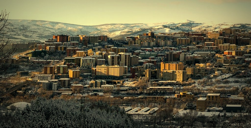 Potenza